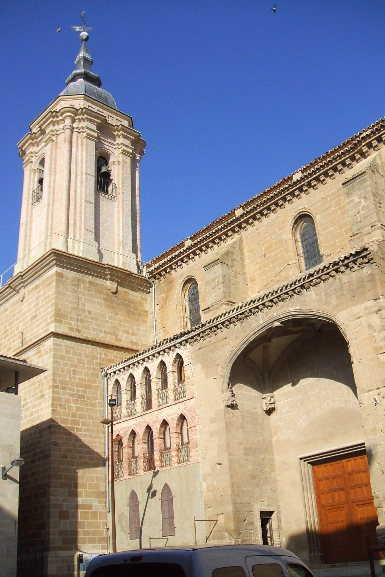 Iglesia de la Asunción de Nuestra Señora (Cascante, Navarra)